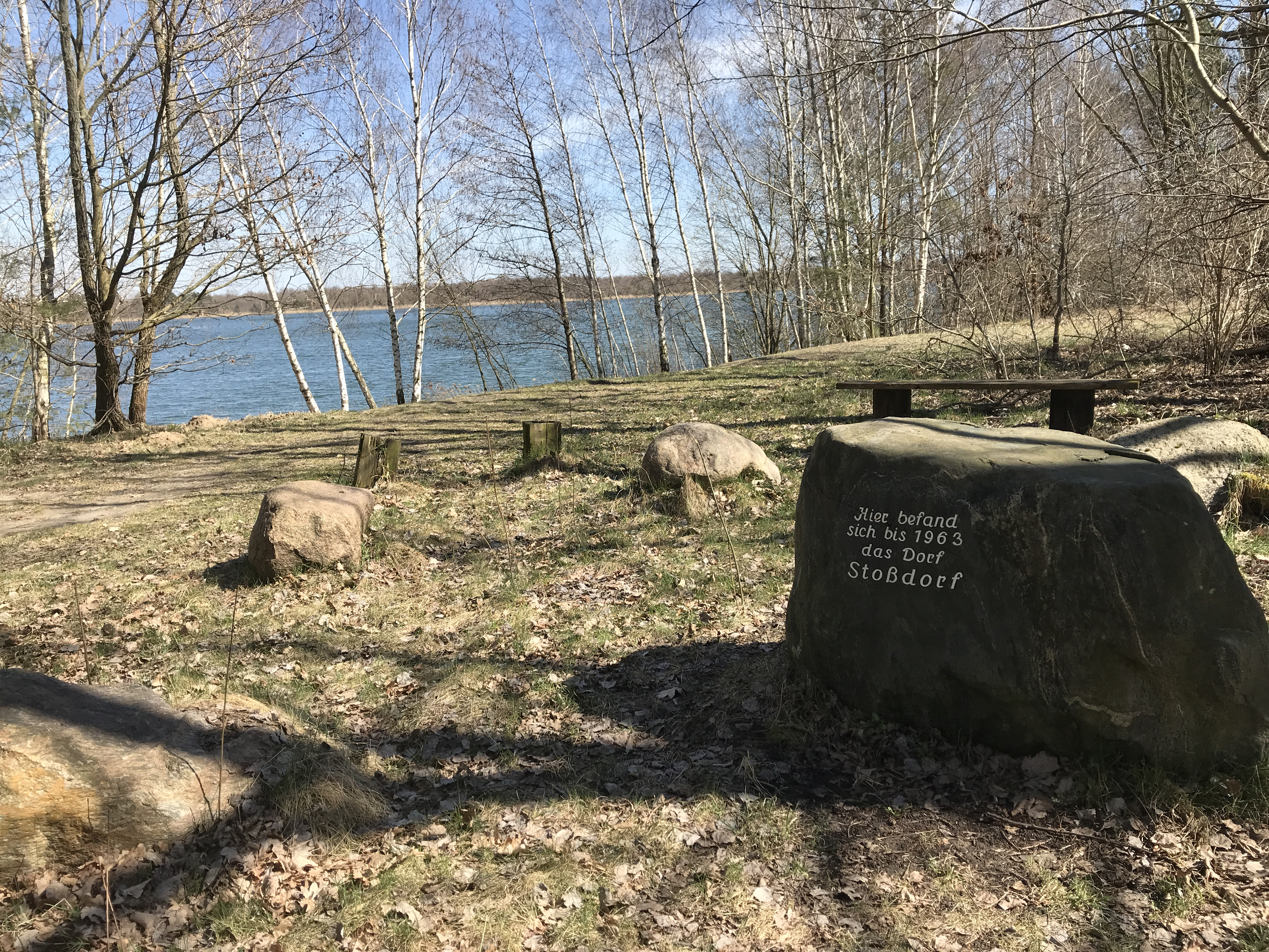 Durch den Braunkohlentagebau Schlabendorf-Nord devastierter Ort Stoßdorf bei Luckau, Brandenburg